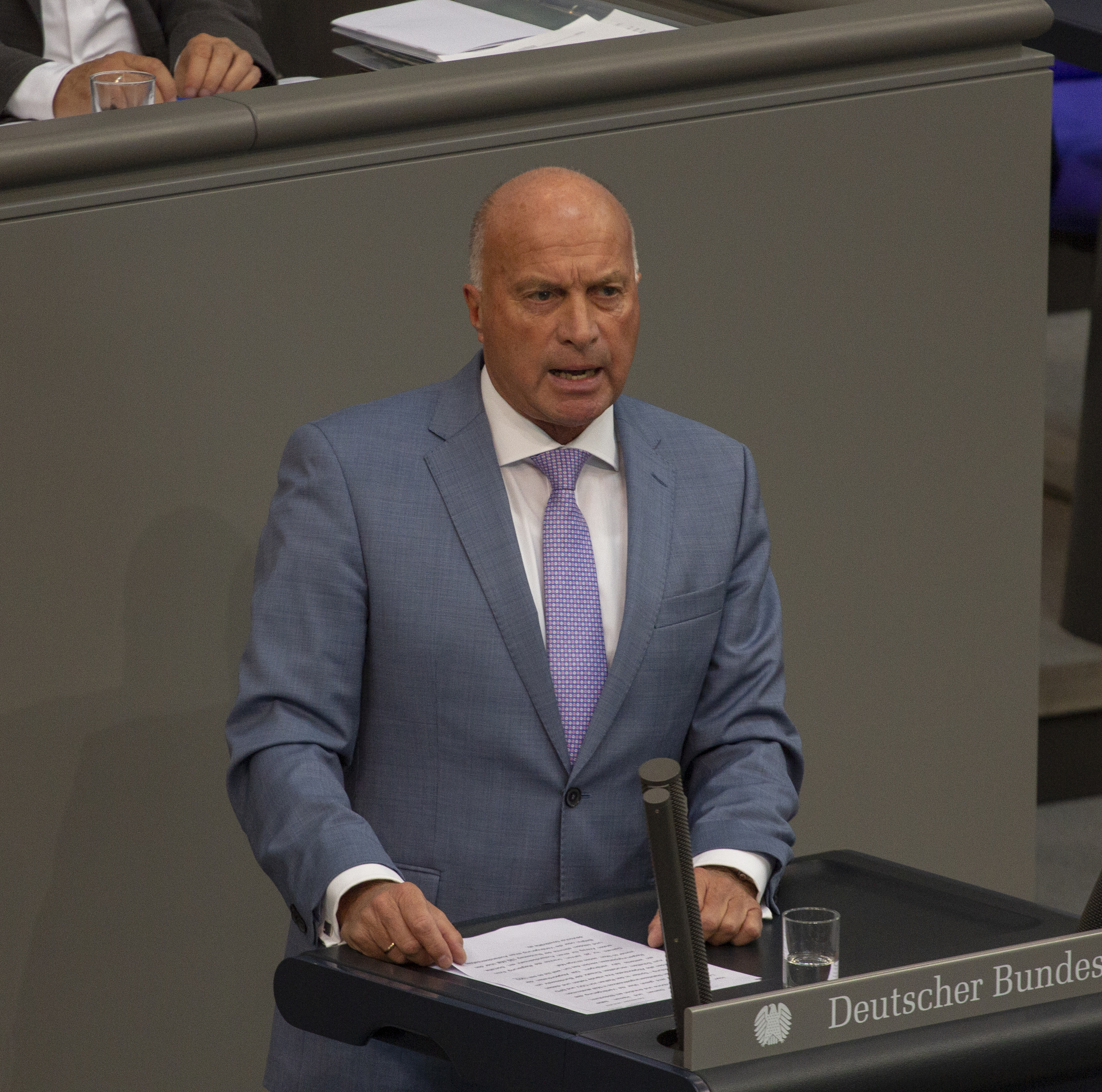 Rüdiger Lucassen Mitglied des Deutschen Bundestages während einer Plenarsitzung am 9. Mai 2019 in Berlin.